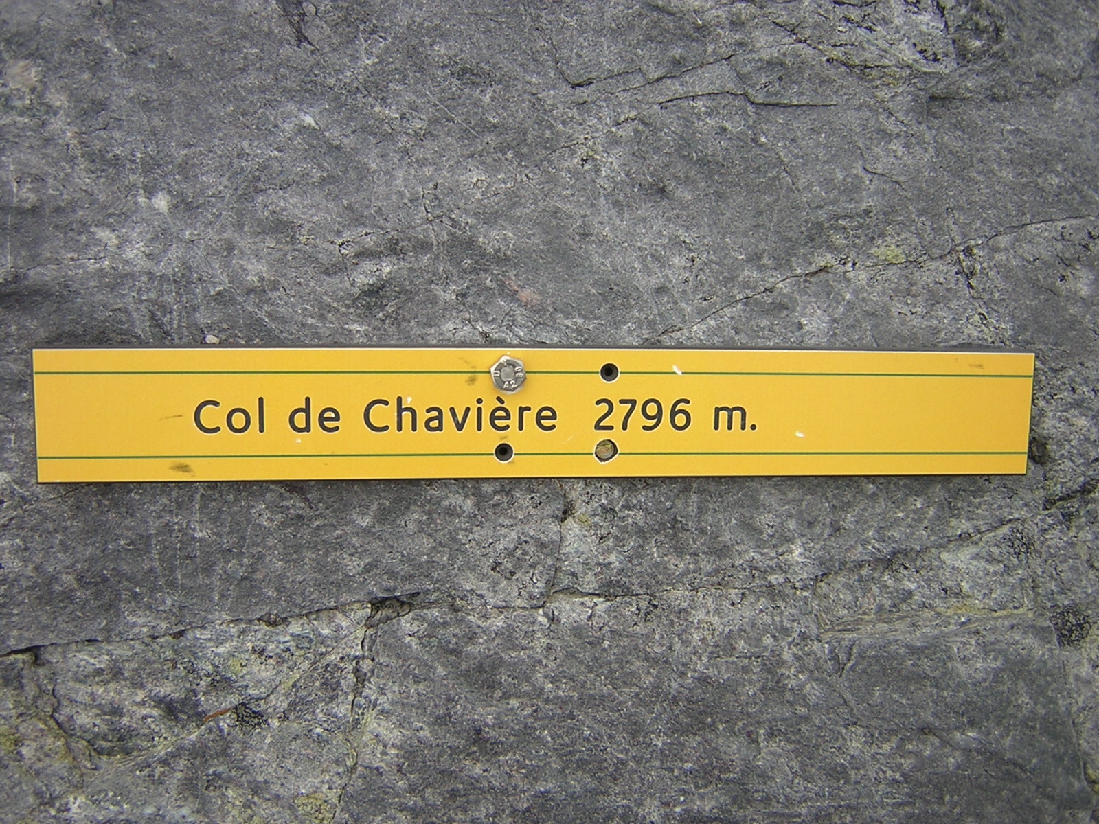 Photo prise par moi-même au sommet du col de Chavière. Indication clouée dans la roche au sommet du col indiquant l'altitude de celui-ci.